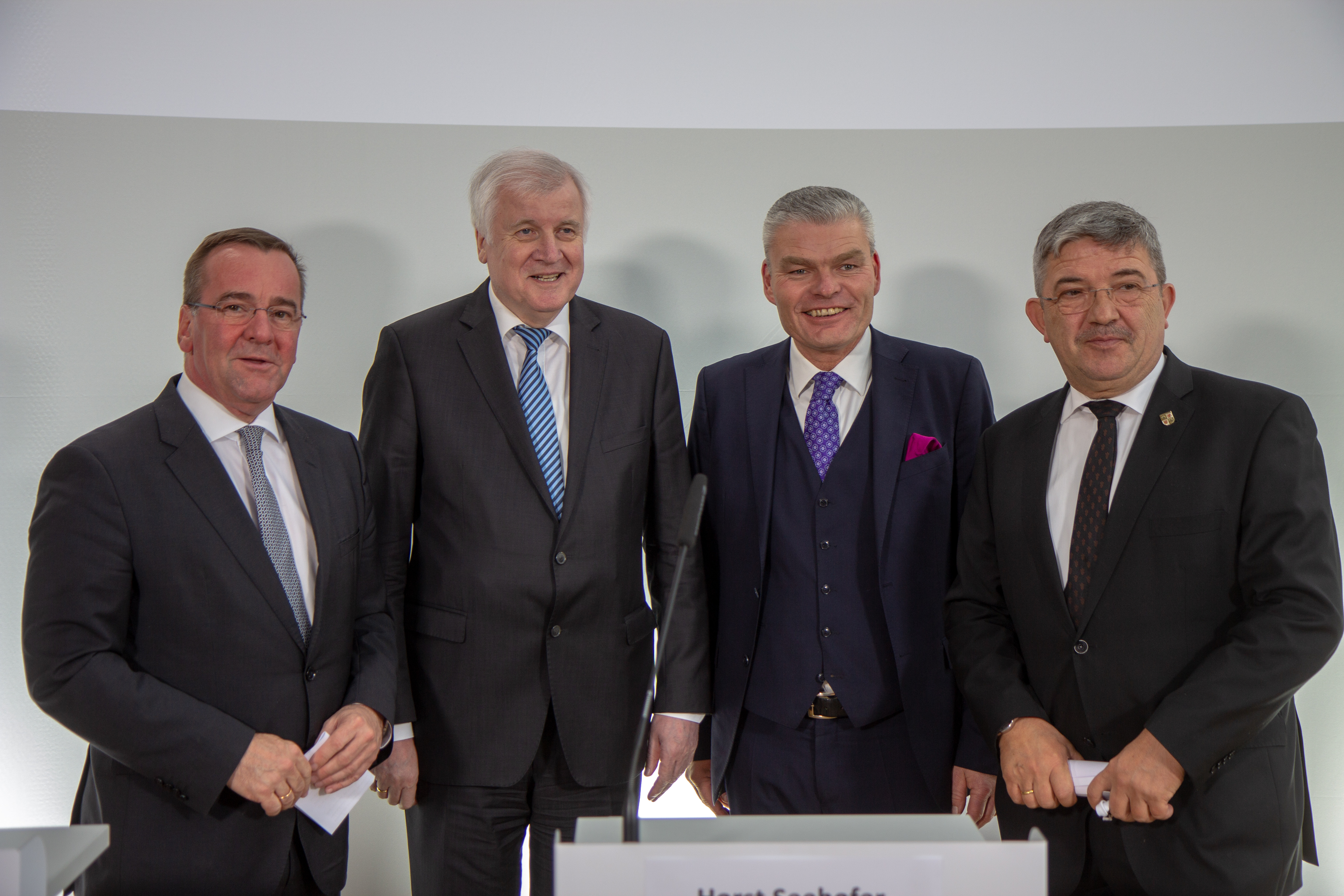 Pressekonferenz zum Abschluss der 209. Innenministerkonferenz vom 28.-30. November in Magdeburg